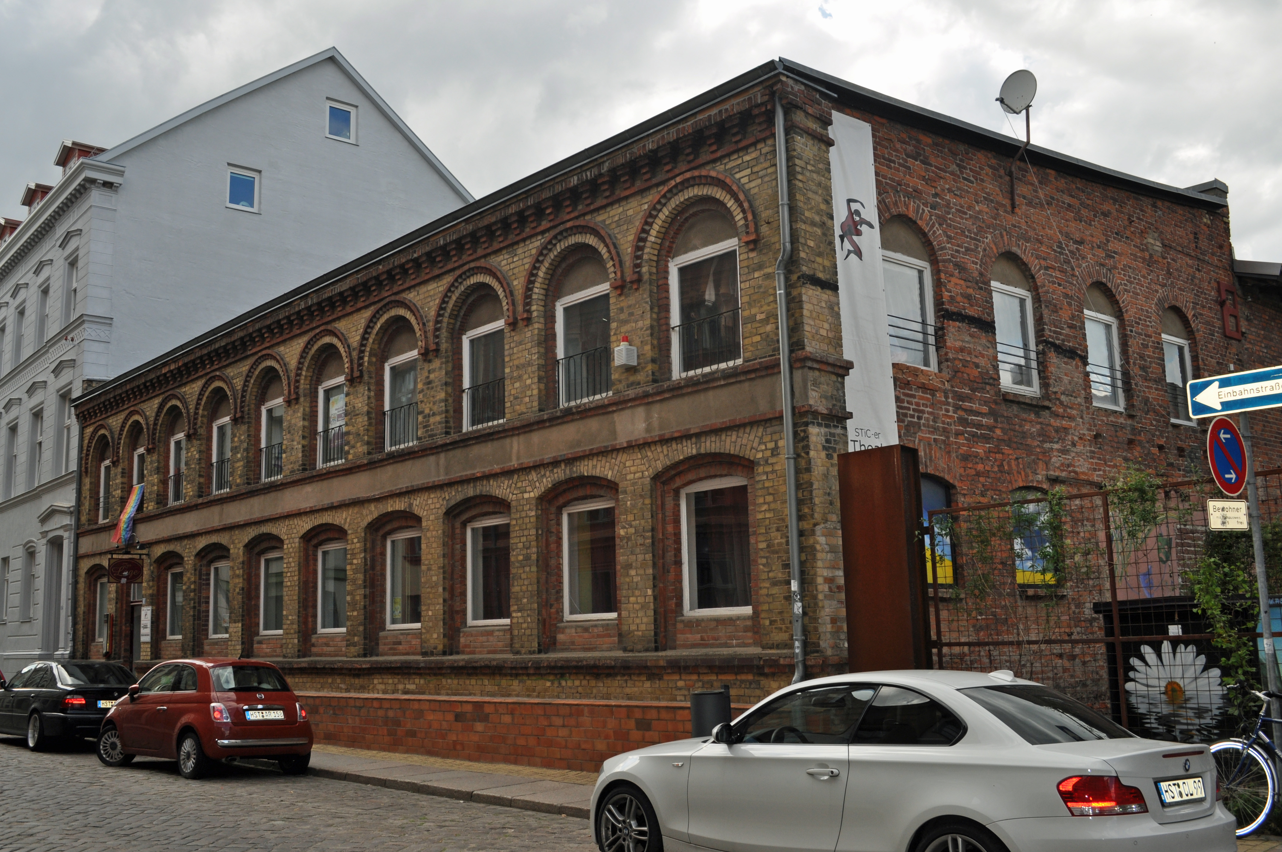 Das Foto zeigt ein Haus (bzw. Details des Hauses) in der Frankenstraße in Stralsund, Deutschland. Die Hausnummer steht im Dateinamen. Aufgenommen am 19. Juli 2011 vom Benutzer:Klugschnacker.